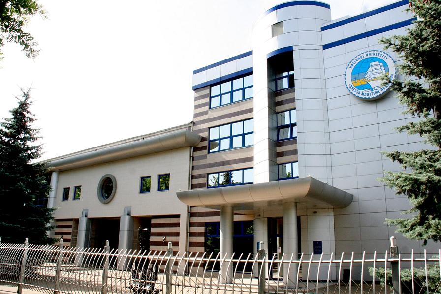 Головний корпус НУ "ОМА"